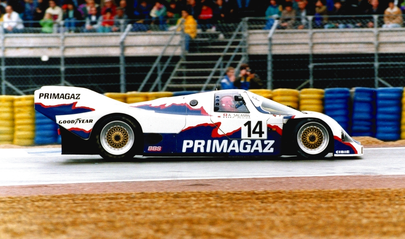 Antoine Salamin sur Porsche 962C aux 24H du Mans 1991.